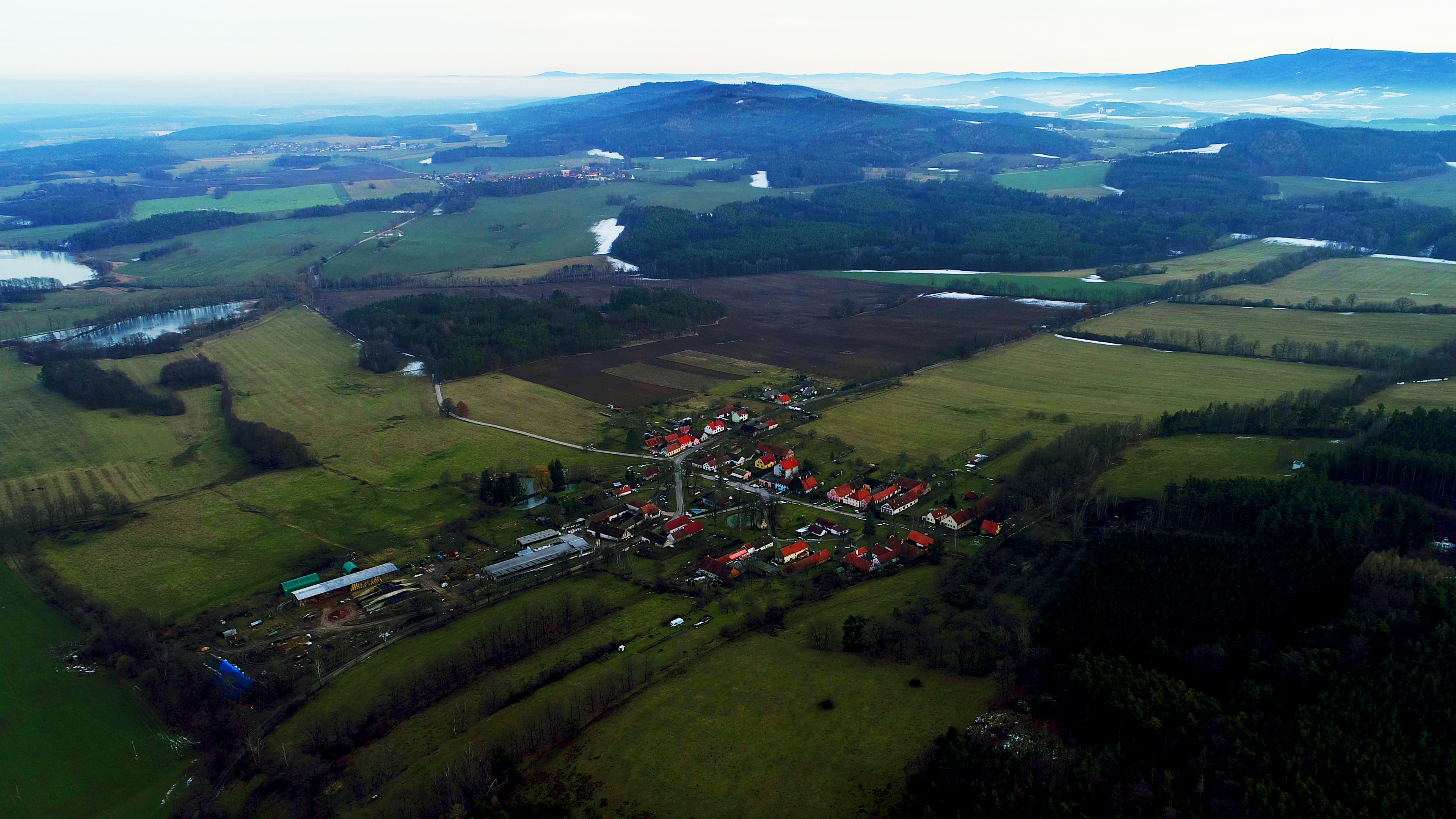 Lipanovice